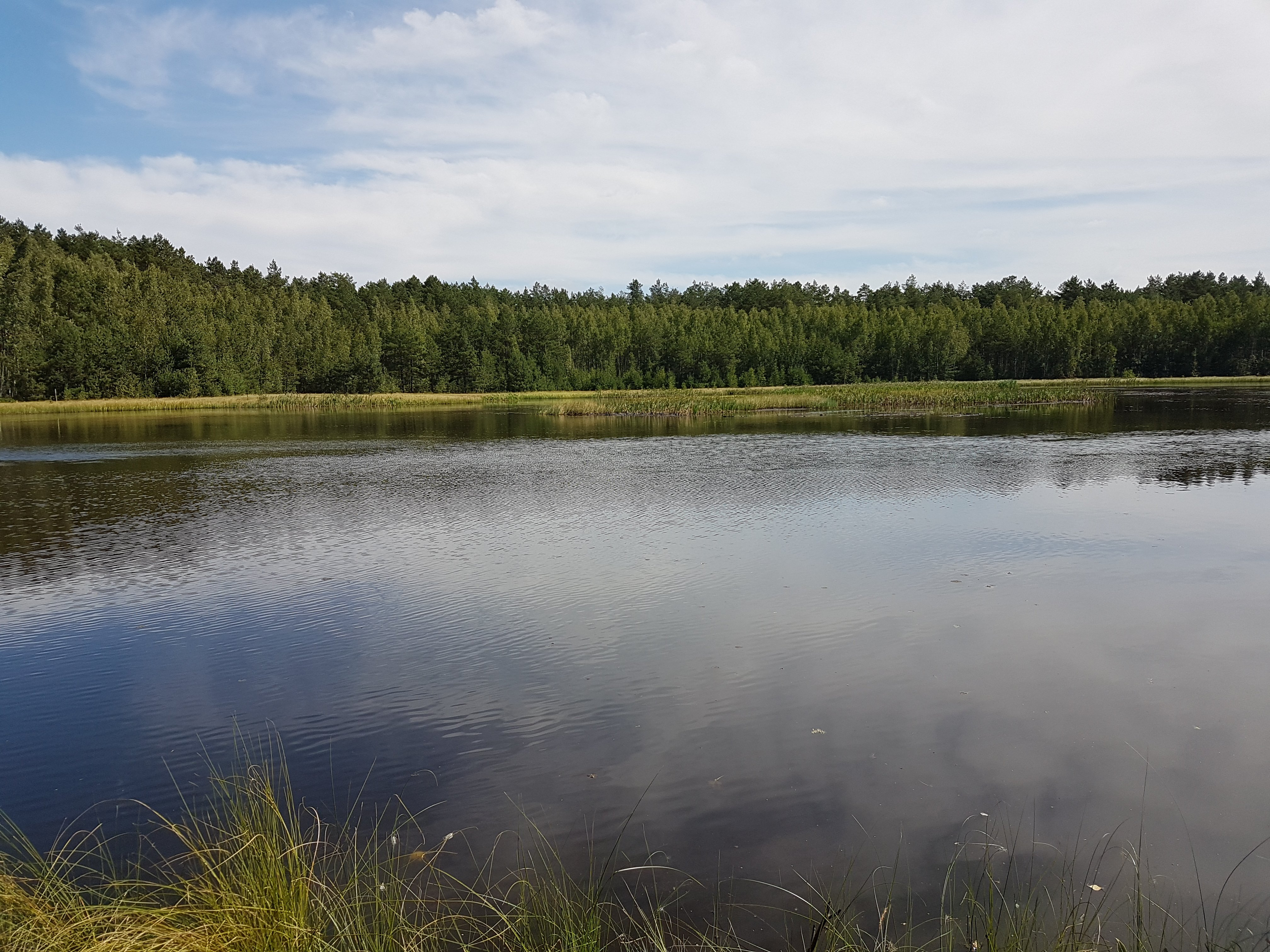 Лесное озеро, Гордеевский р-н